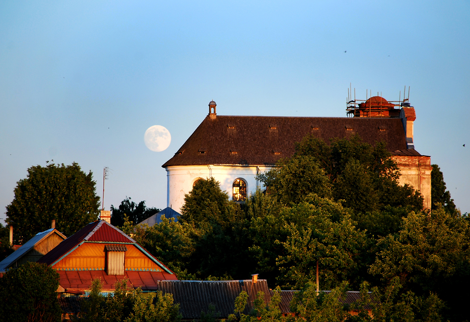 Беларуская (тарашкевіца): Былы калегіум езуітаў:касцёлкляштарны корпус з сюжэтнымі роспісамі ў інтэр’еры келляў і трапезнай. г. Амсьціслаў This is a photo of Belarusian heritage monument. Reference number: 512Г000510 ( WLM)